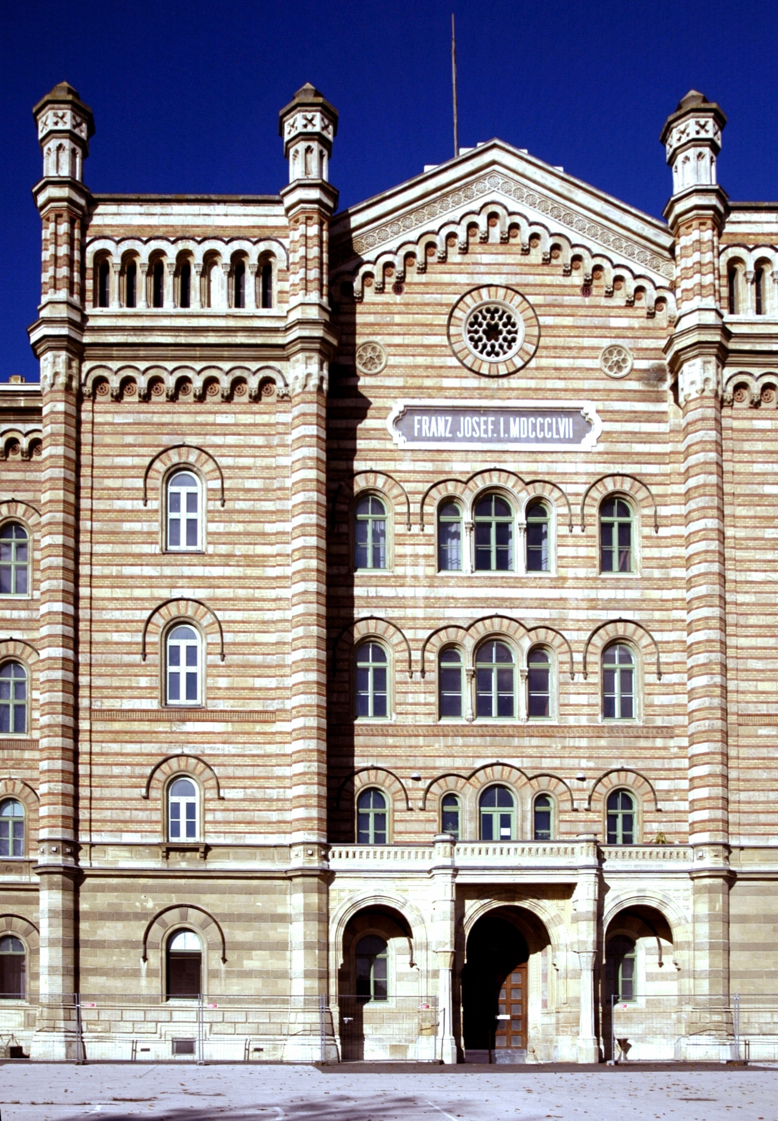 Martin-Kaserne, Hauptgebäude der Kaserne, Objekt 4, Mittelteil Süd mit linkem Risalit